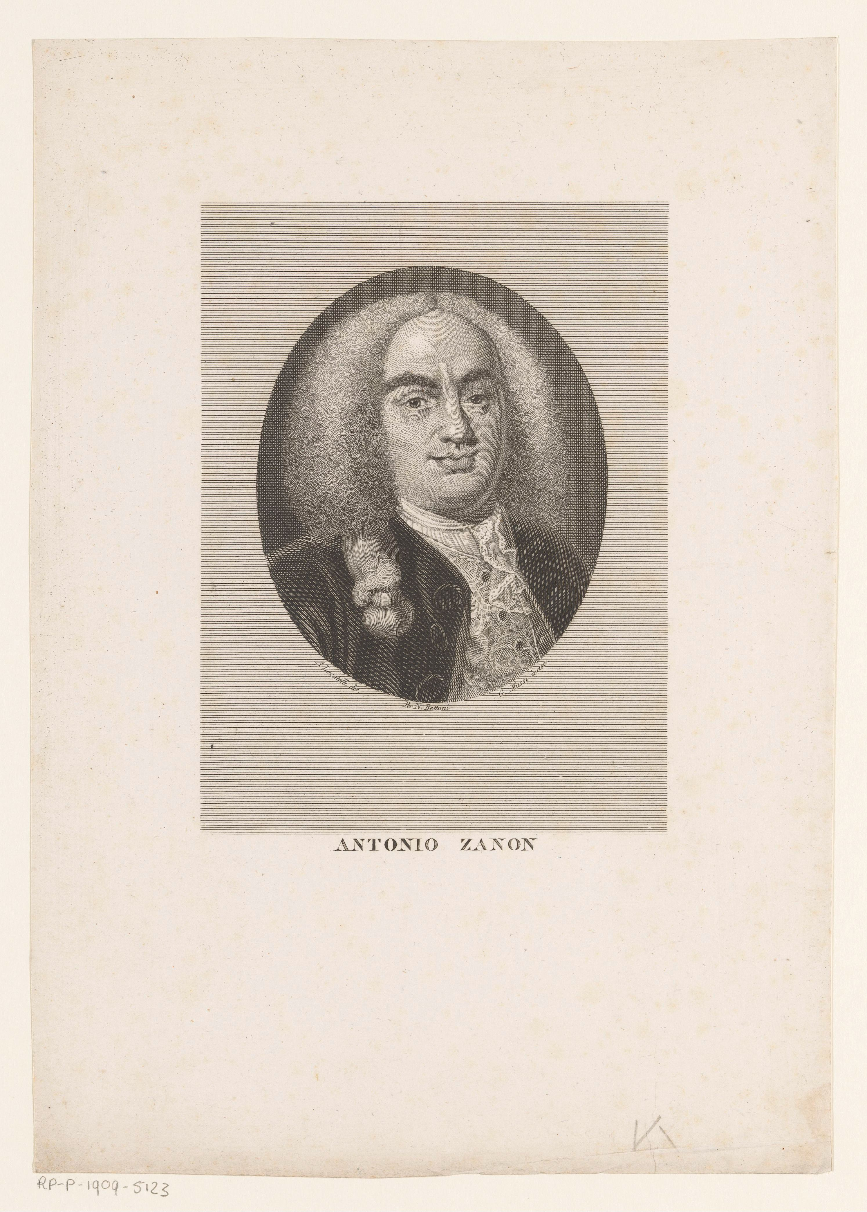 IdentificatieTitel(s): Portret van econoom Antonio ZanonObjecttype: prent Objectnummer: RP-P-1909-5123Opschriften / Merken: verzamelaarsmerk, verso, gestempeld: Lugt 2228VervaardigingVervaardiger: prentmaker: G. Mussi (vermeld op object)naar tekening van: A. Locatelli (vermeld op object)uitgever: Niccolò Bettoni (vermeld op object)Plaats vervaardiging: ItaliëDatering: 1875 - 1920Fysieke kenmerken: ets en gravureMateriaal: papier Techniek: graveren (drukprocedé) / etsenAfmetingen: blad: h 312 mm (Binnen plaatrand afgesneden.) × b 220 mm (Binnen plaatrand afgesneden.)OnderwerpWat: historical personsWie: Antonio ZanonVerwerving en rechtenVerwerving: aankoop 1905Copyright: Publiek domein